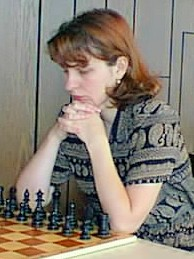 Nataša Bojković, Sparkassen-Chess-Meeting 1998 in Dortmund, Meisterturnier der "Kategorie IV".